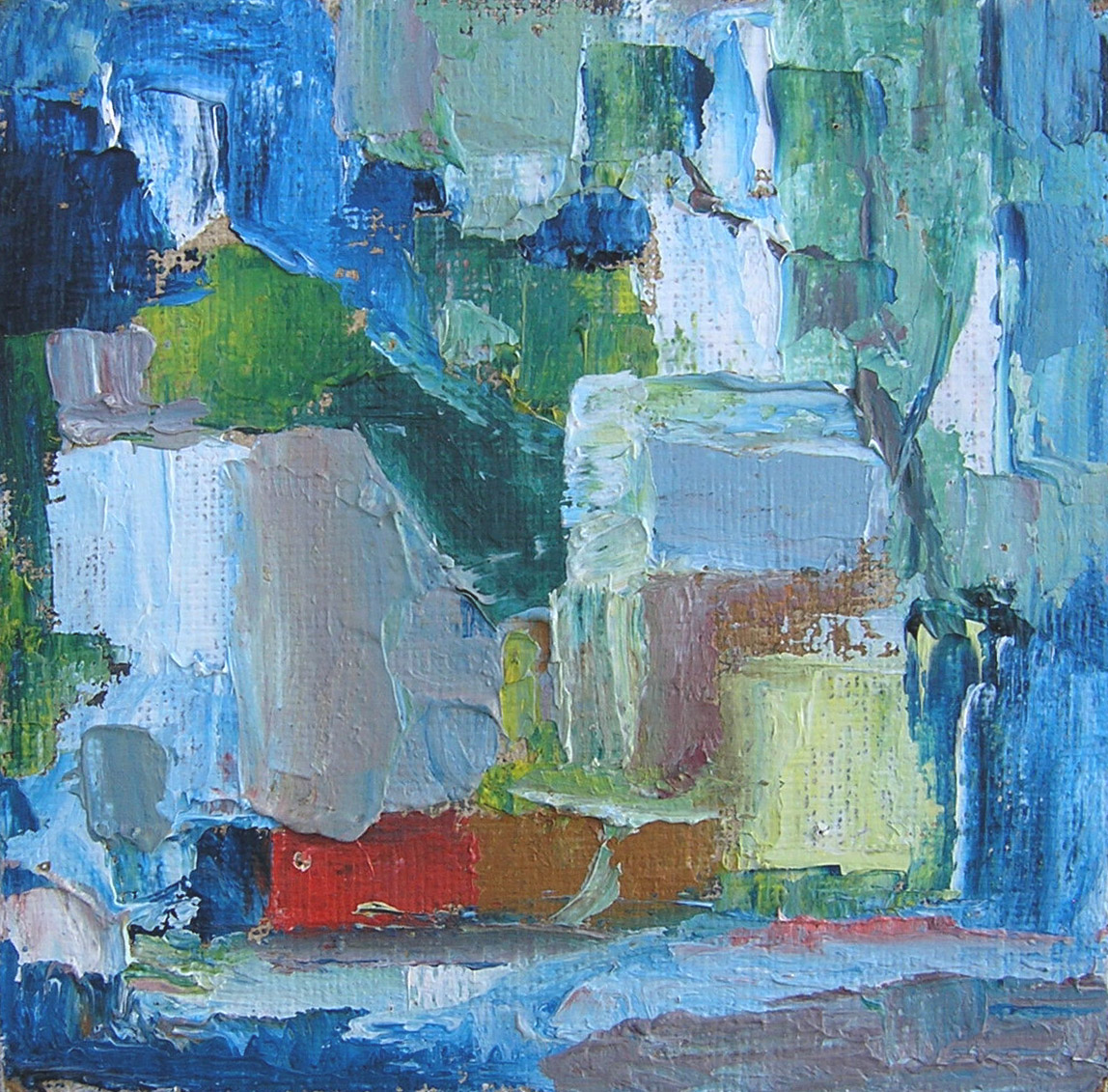 Landscape